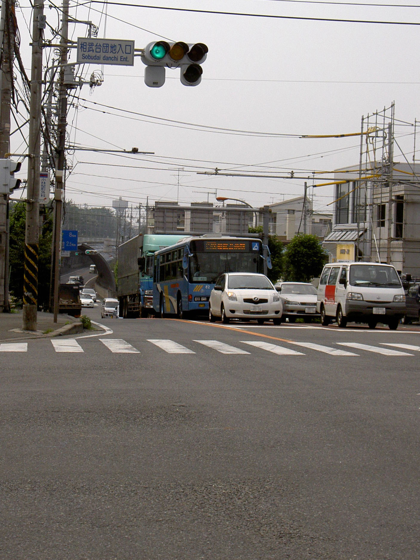 Kanagawa prefectural road route 507 ja: 神奈川県道507号相武台相模原線